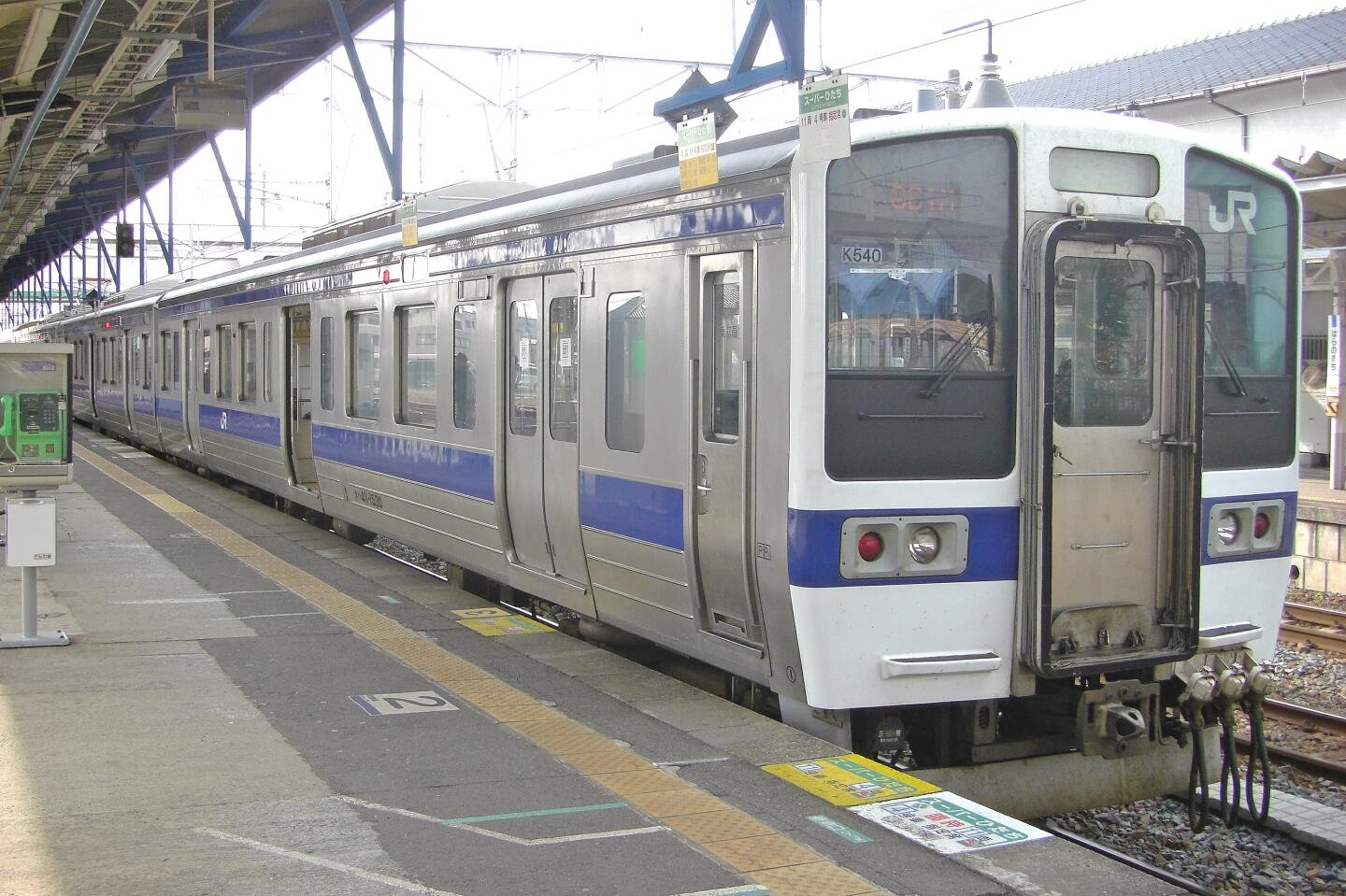 415系1500番台のドアカット